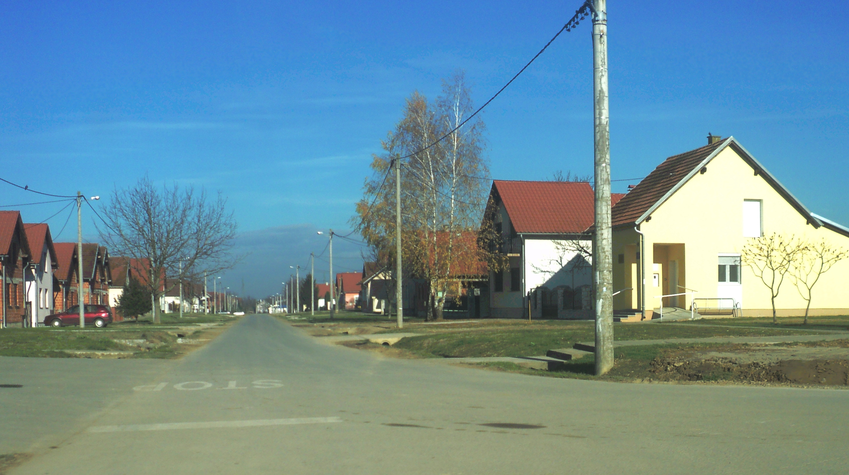 Bogdanovci ulica Matije Gupca